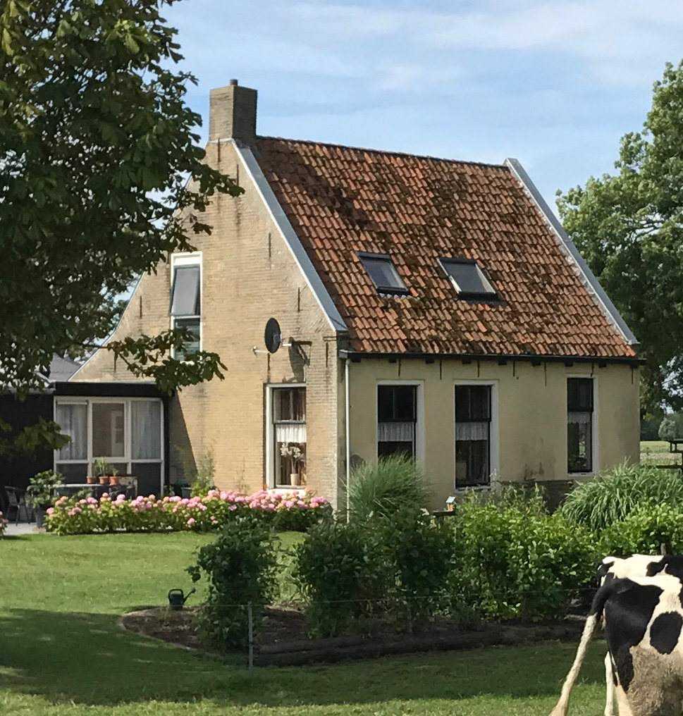 Skippersdykje 1